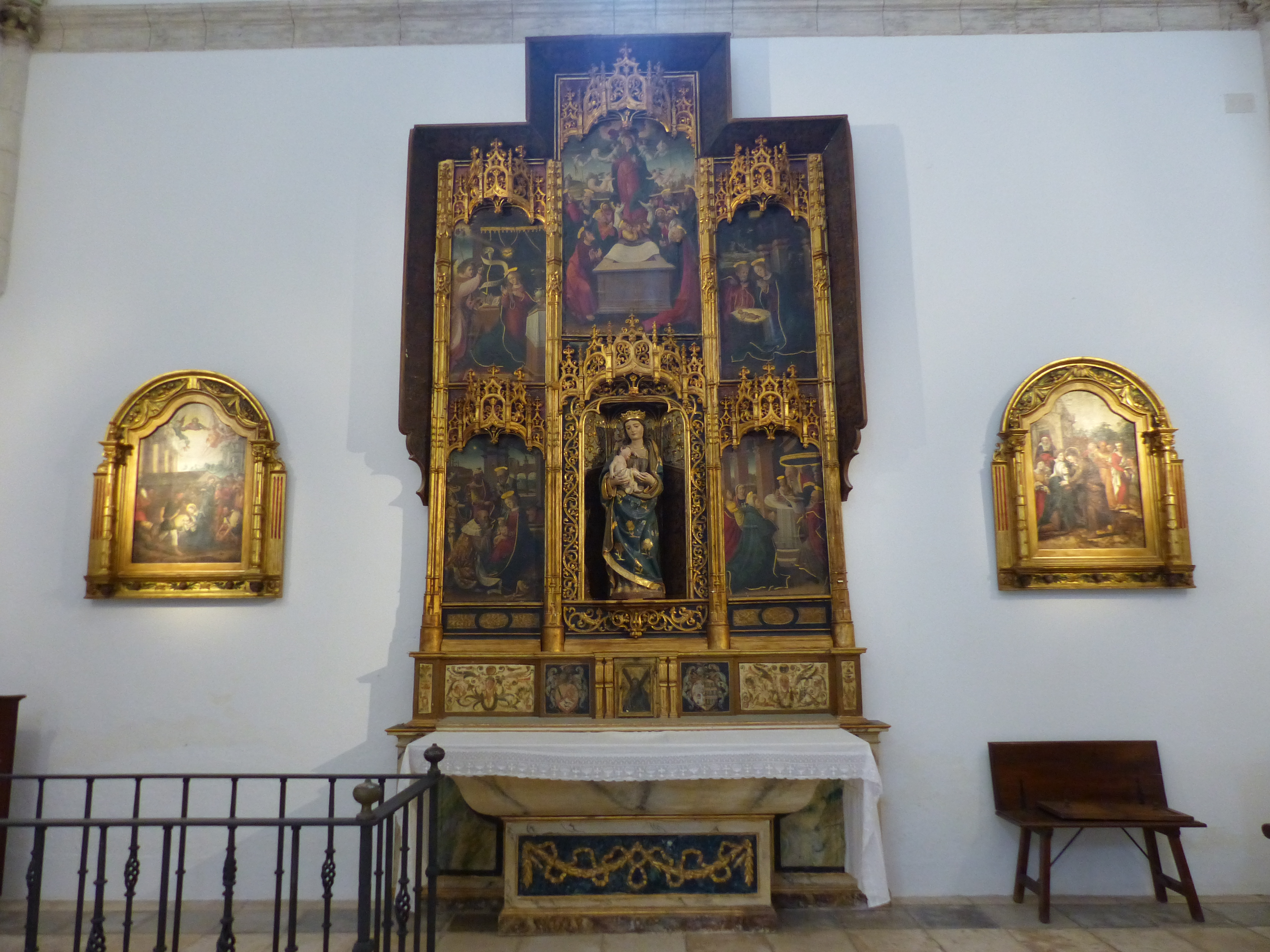 Interior de la Colegiata de Osuna